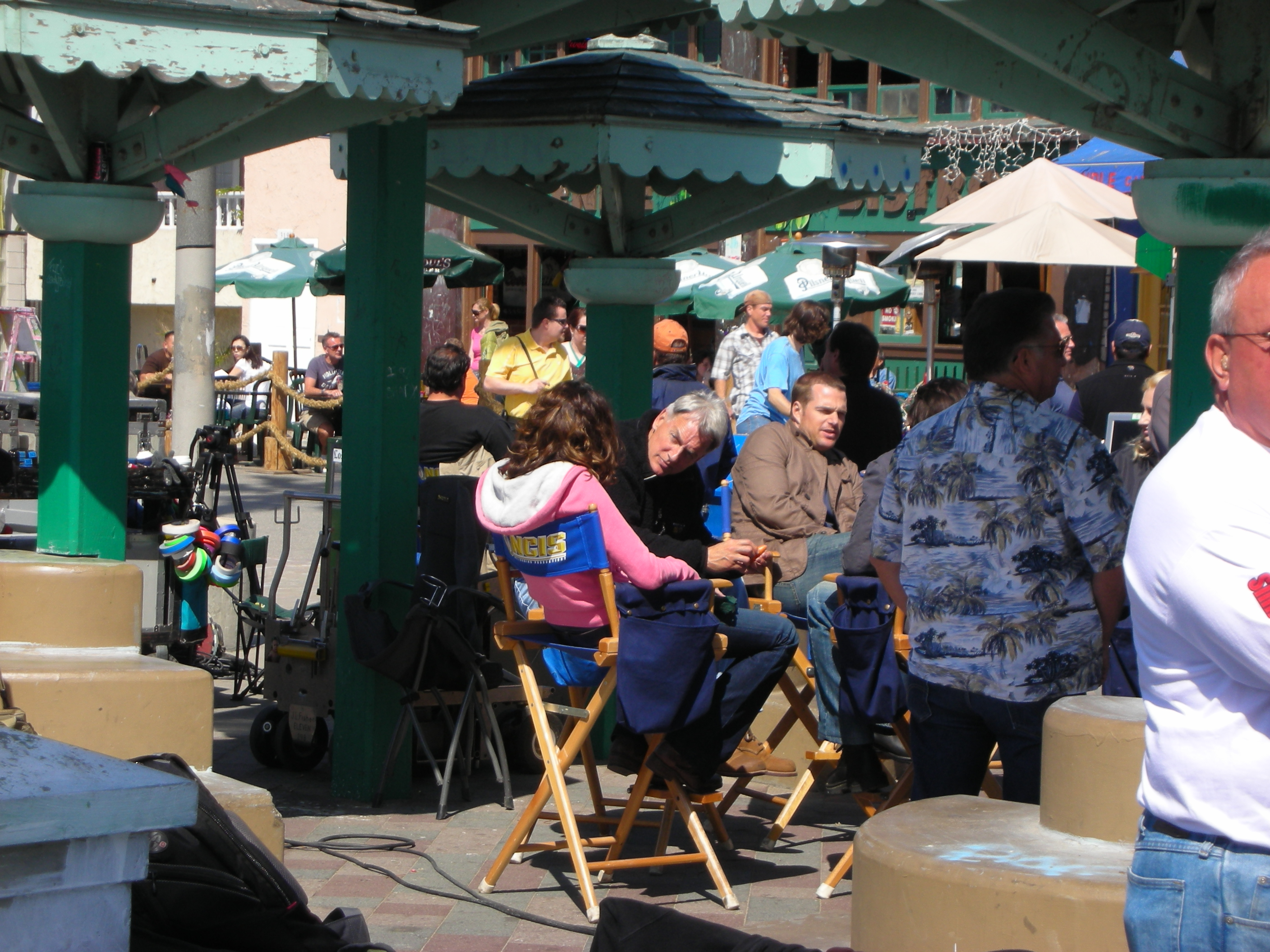 NCIS Filming